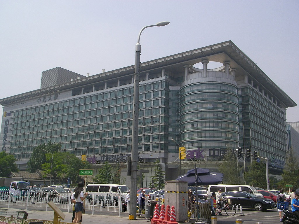 China everbright bank beijing 201705